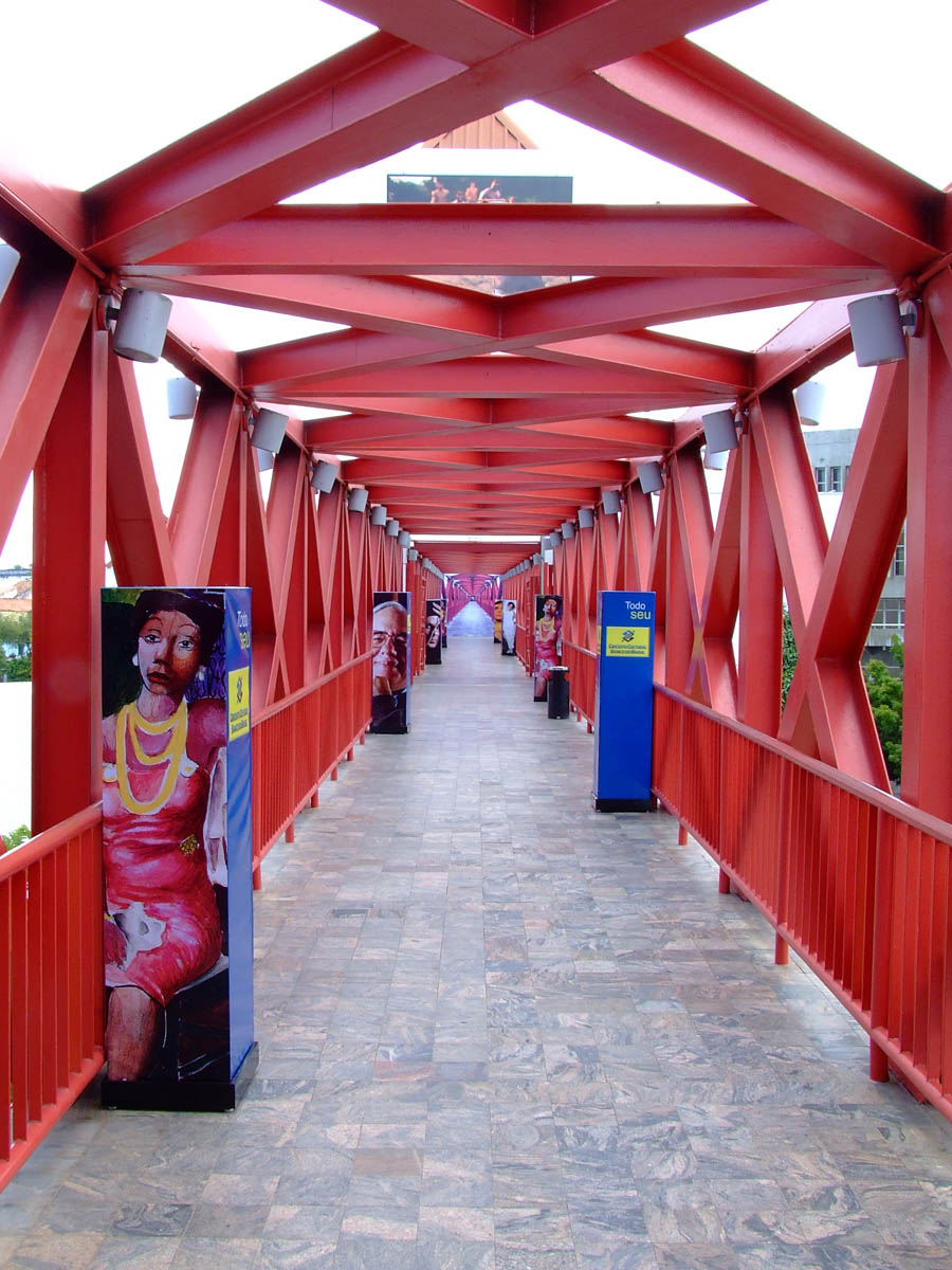 File:Centro Dragão do Mar de Arte e Cultura (3)